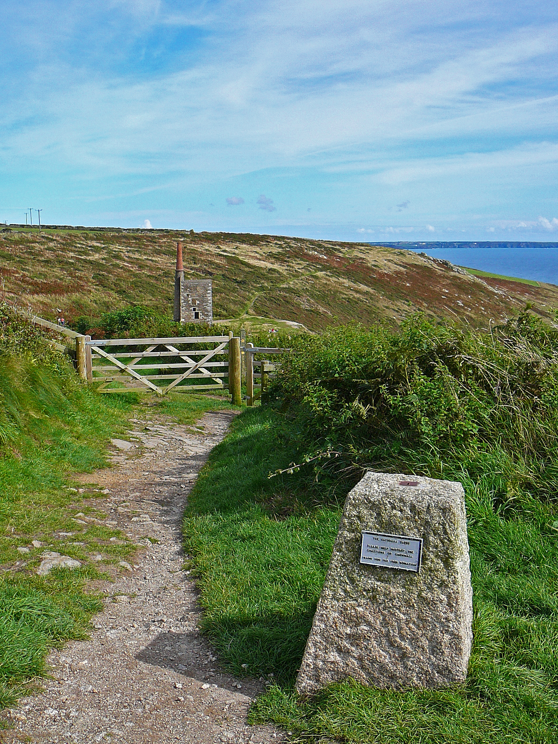 Rinsey